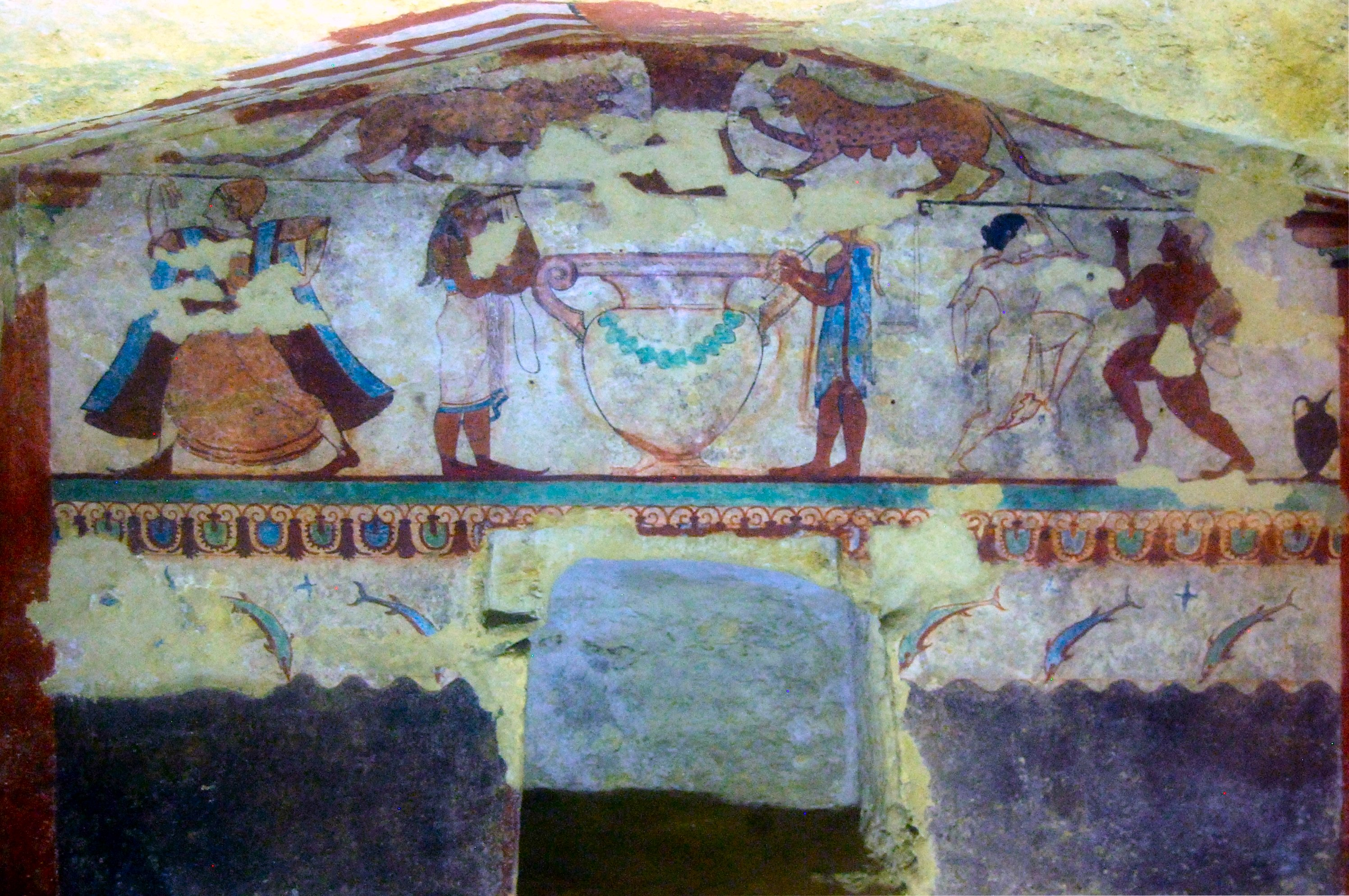 Das Innere des als Tomba delle Leonesse bezeichneten etruskischen Grabes bei der mittelitalienischen Stadt Tarquinia